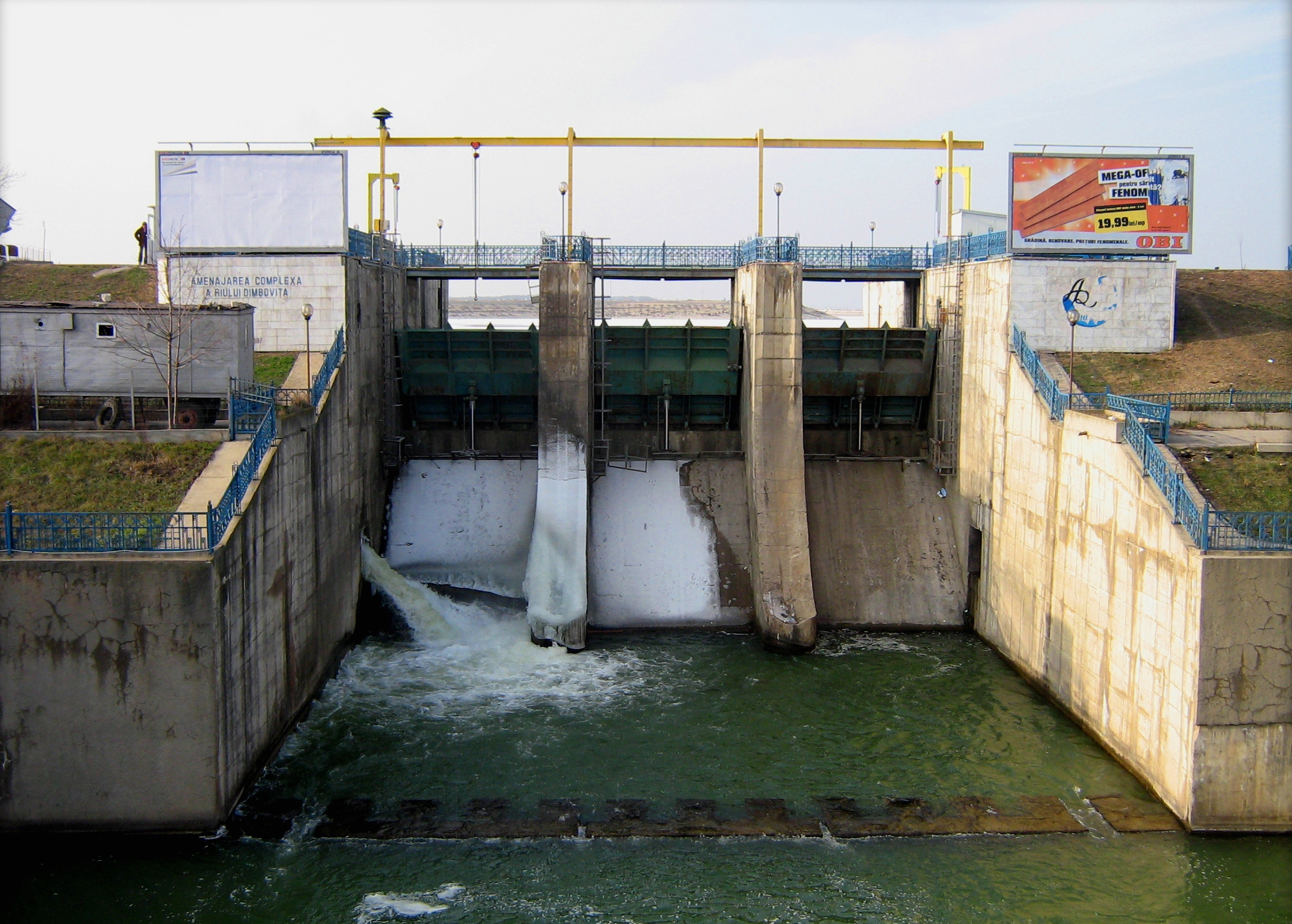 Baraj pe Lacul Morii, Bucuresti / Watermill Lake, Bucharest